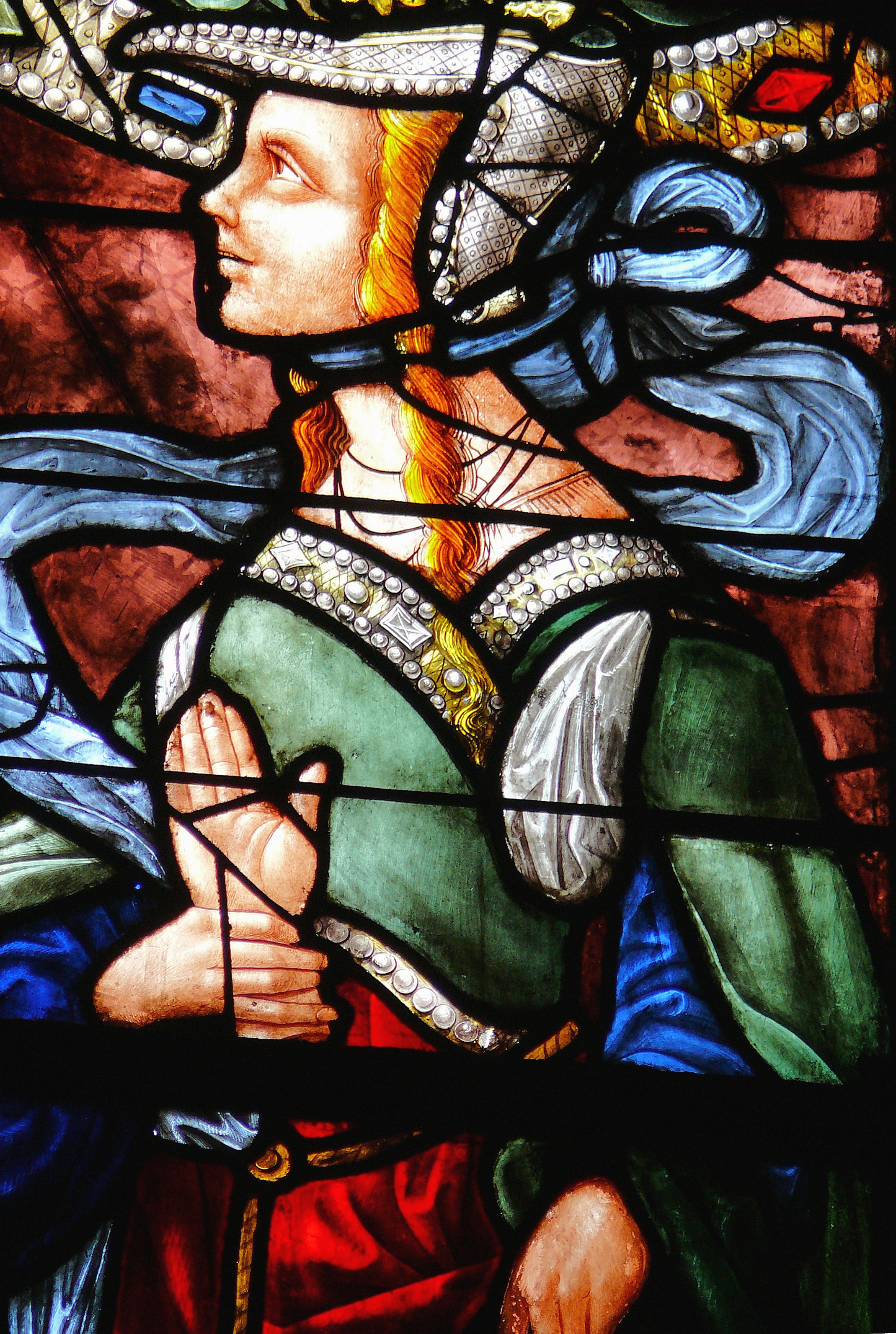 Auch - Cathédrale Sainte-Marie - Vitrail - Détail